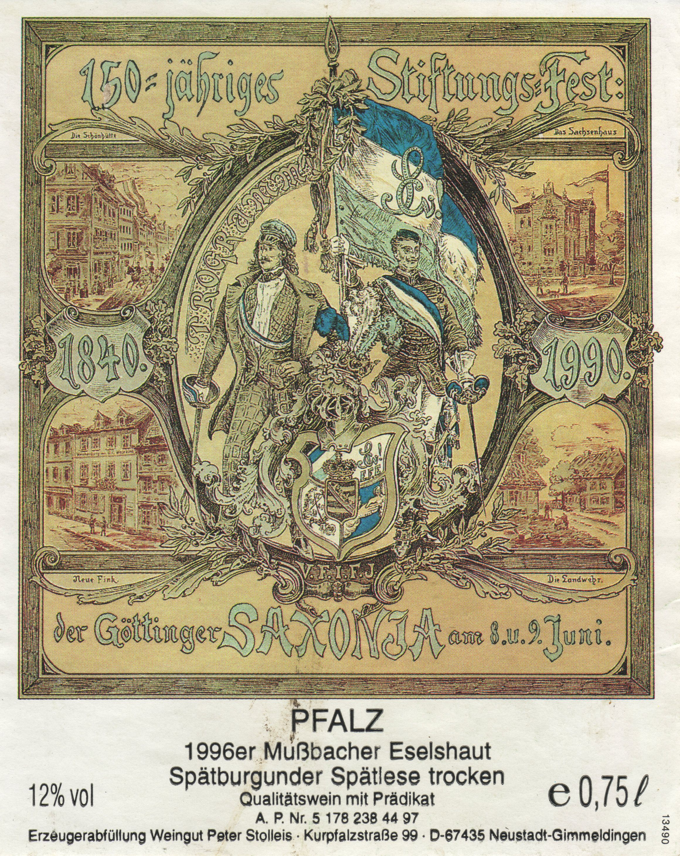 Flaschenetikett eines Pfälzer Weins zum 150. Stiftungsfest des Corps Saxonia Göttingen